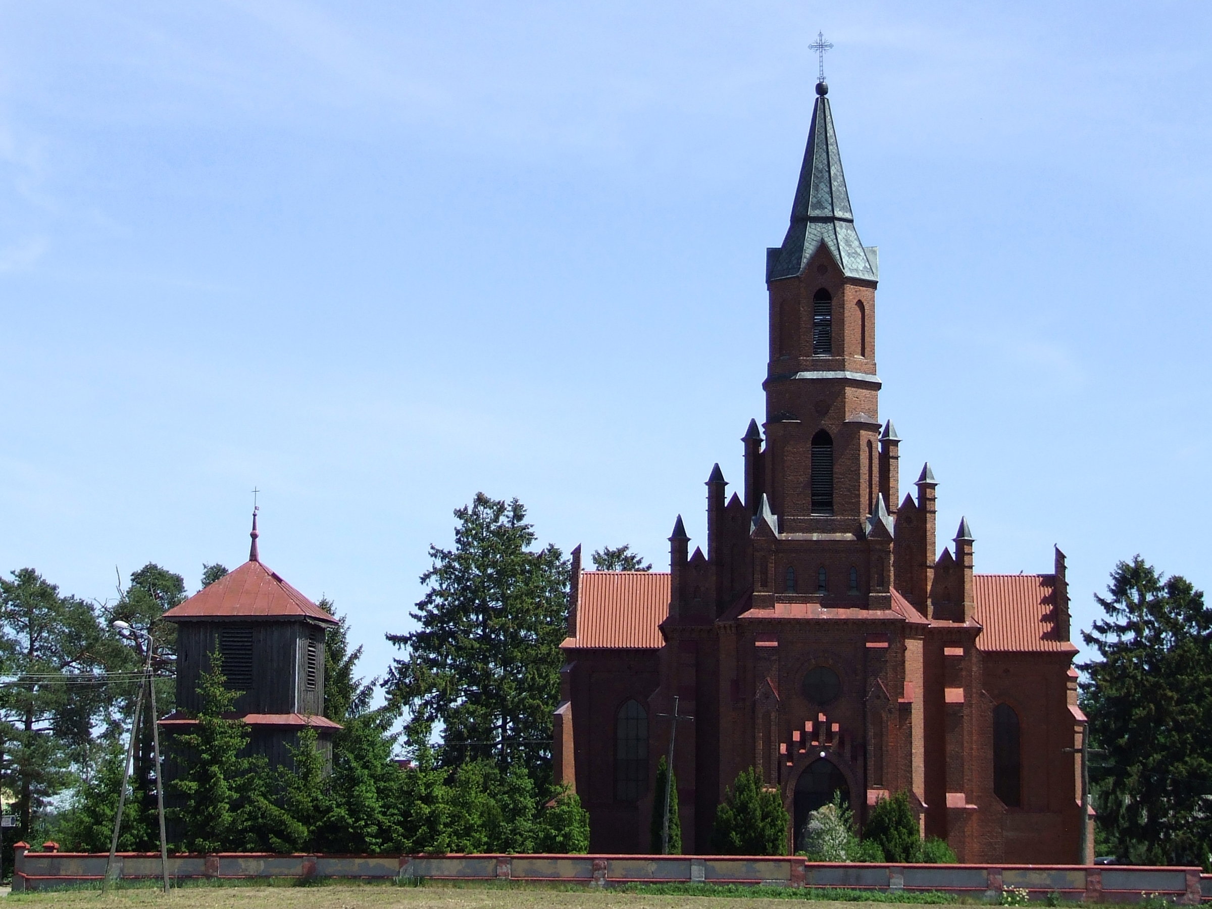 Zalas. Kościół pod wezwaniem św. Stanisława Kostki